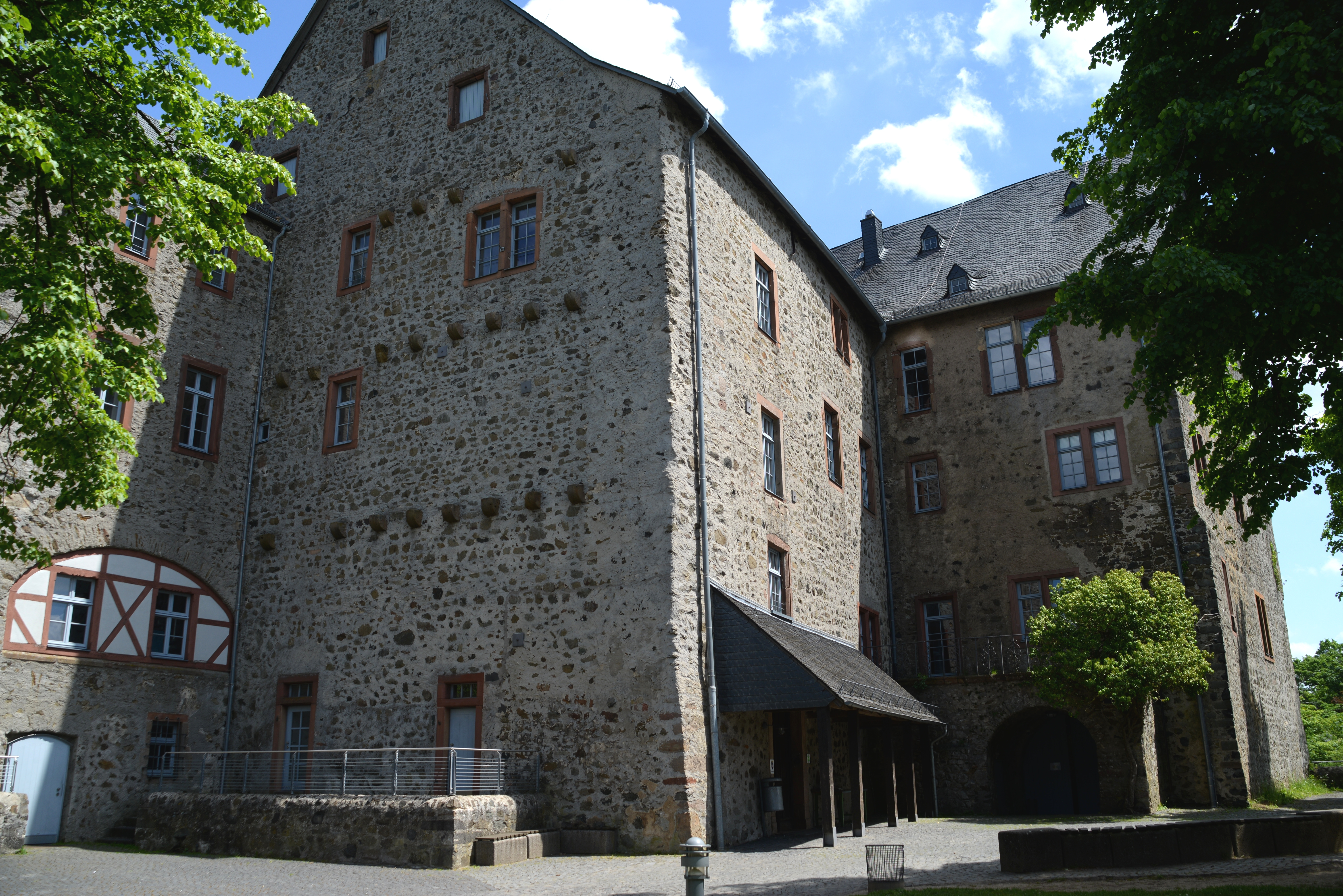 Burg Hohensolms This is a photograph of an architectural monument.It is on the list of cultural monuments of Hohenahr